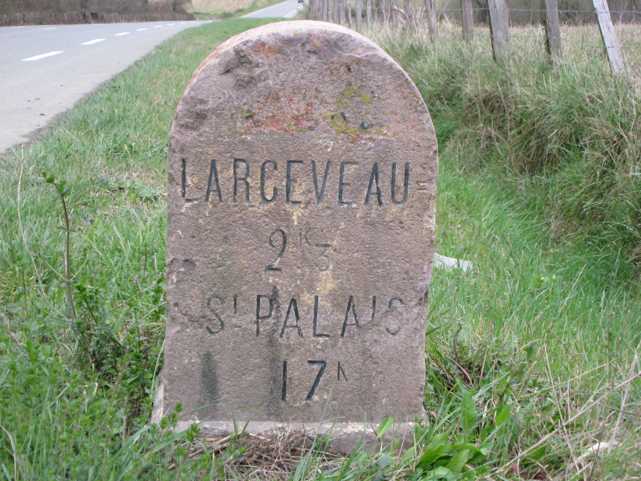 Borne kilométrique à Larcevau (Pyrénées-Atlantiques) (Pyrénées).